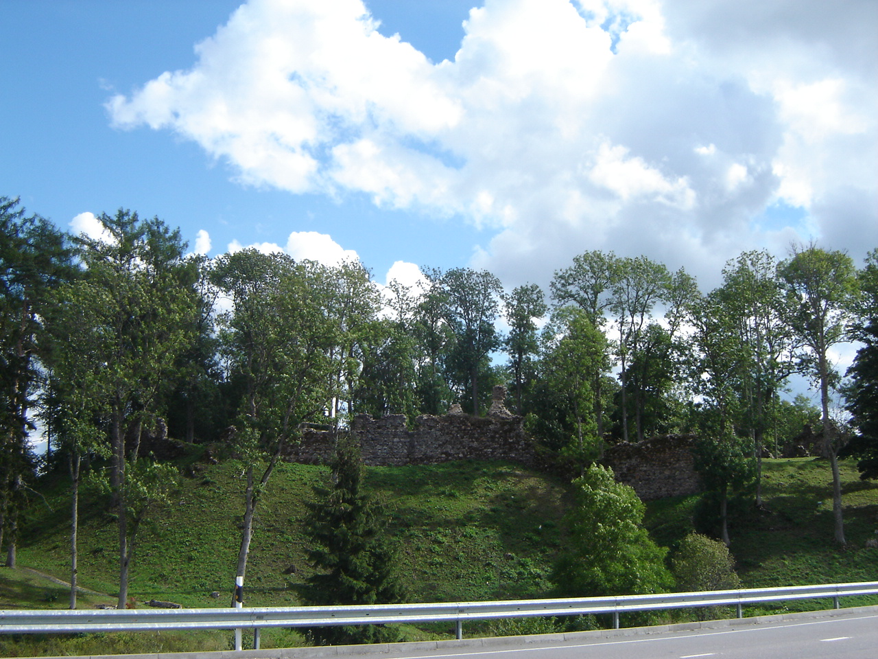 Varemetas Helme ordulinnuse müürid.